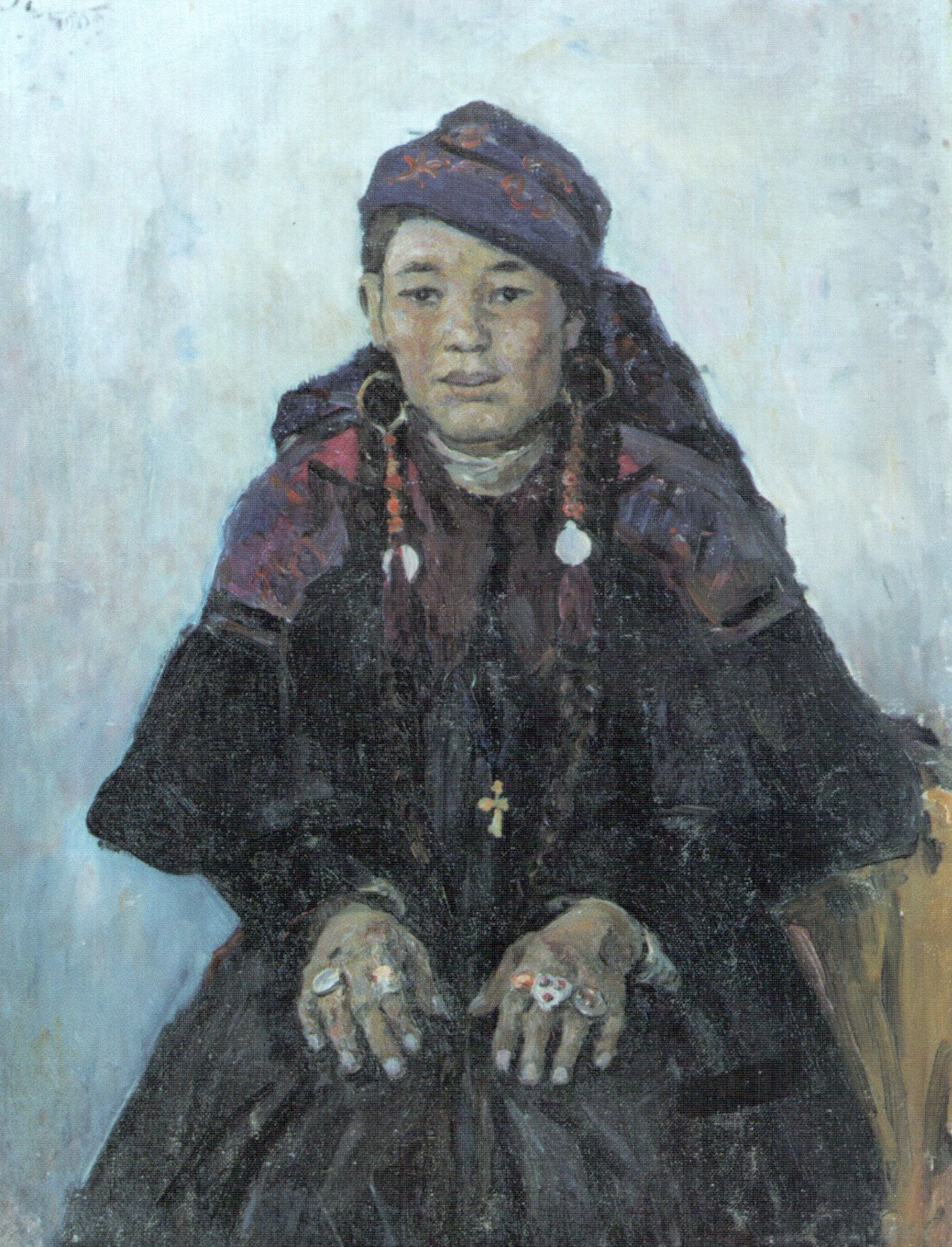 Портрет хакаски. Холст, масло. 59х44,5. Музей-усадьба В. И. Сурикова